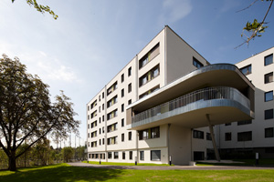 Haus Föhrenhof, 1130 Wien